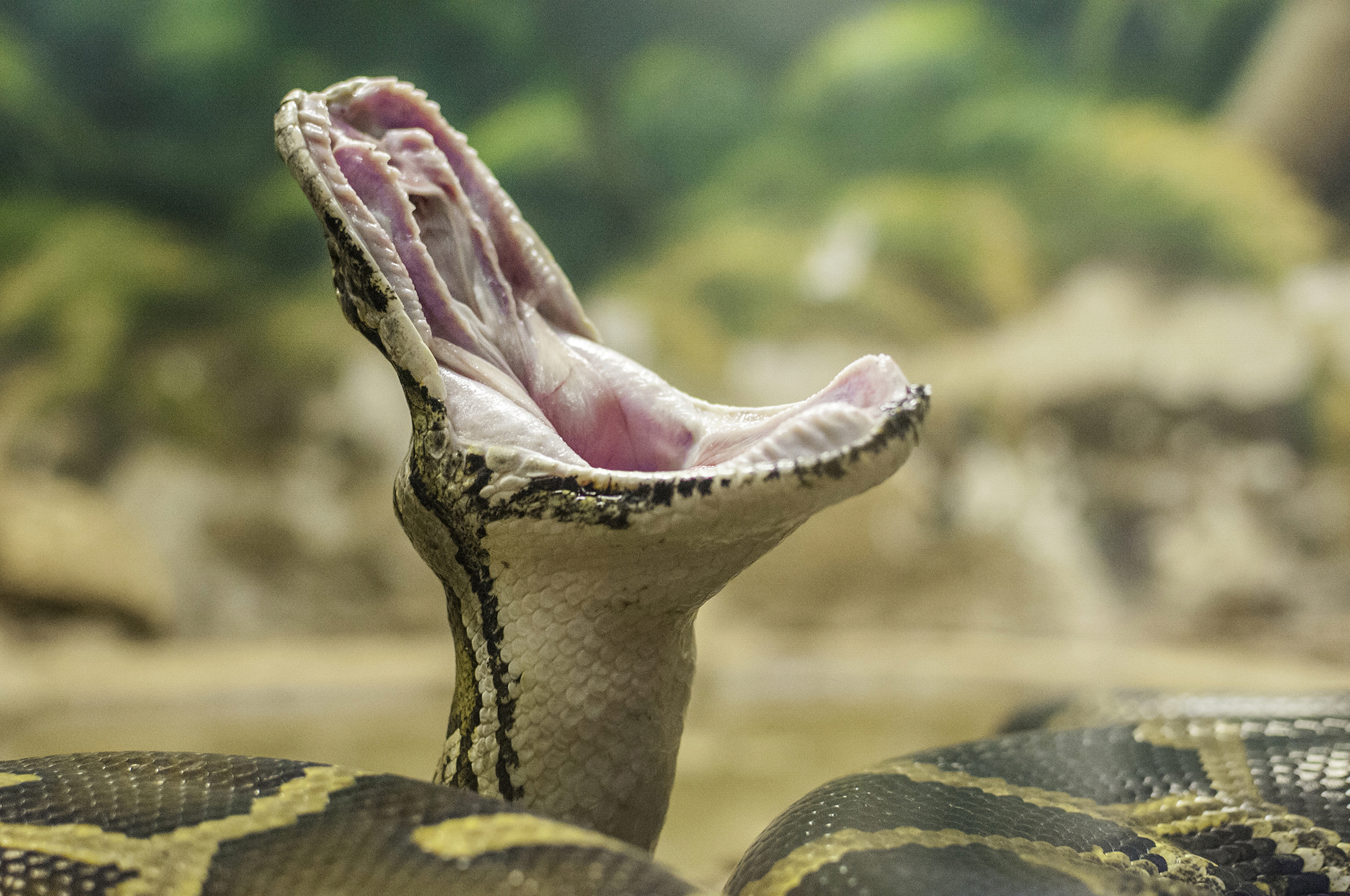 Cobra no parque de Jaraguá